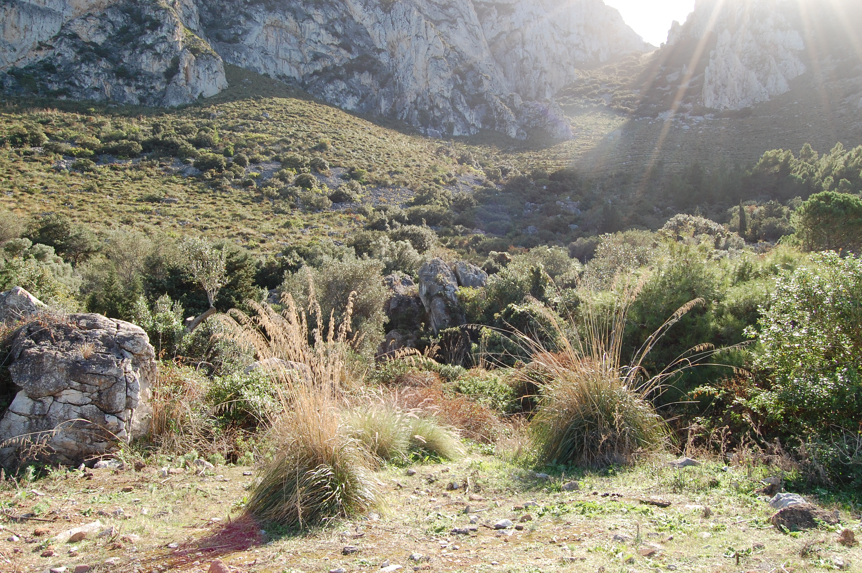 Riserva naturale Capo Gallo